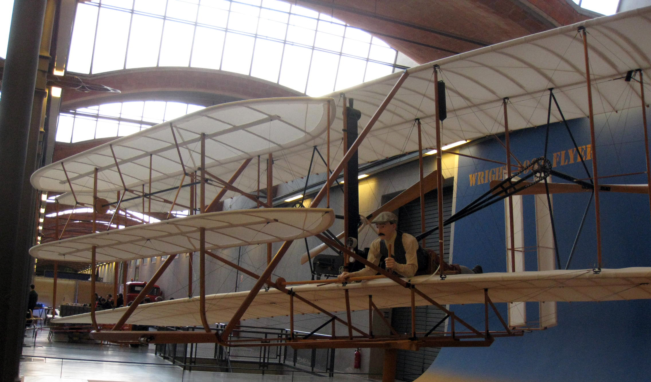 Fàbrica Aymerich, Amat i Jover (Terrassa) Object location41° 33′ 54.49″ N, 2° 00′ 28.14″ E